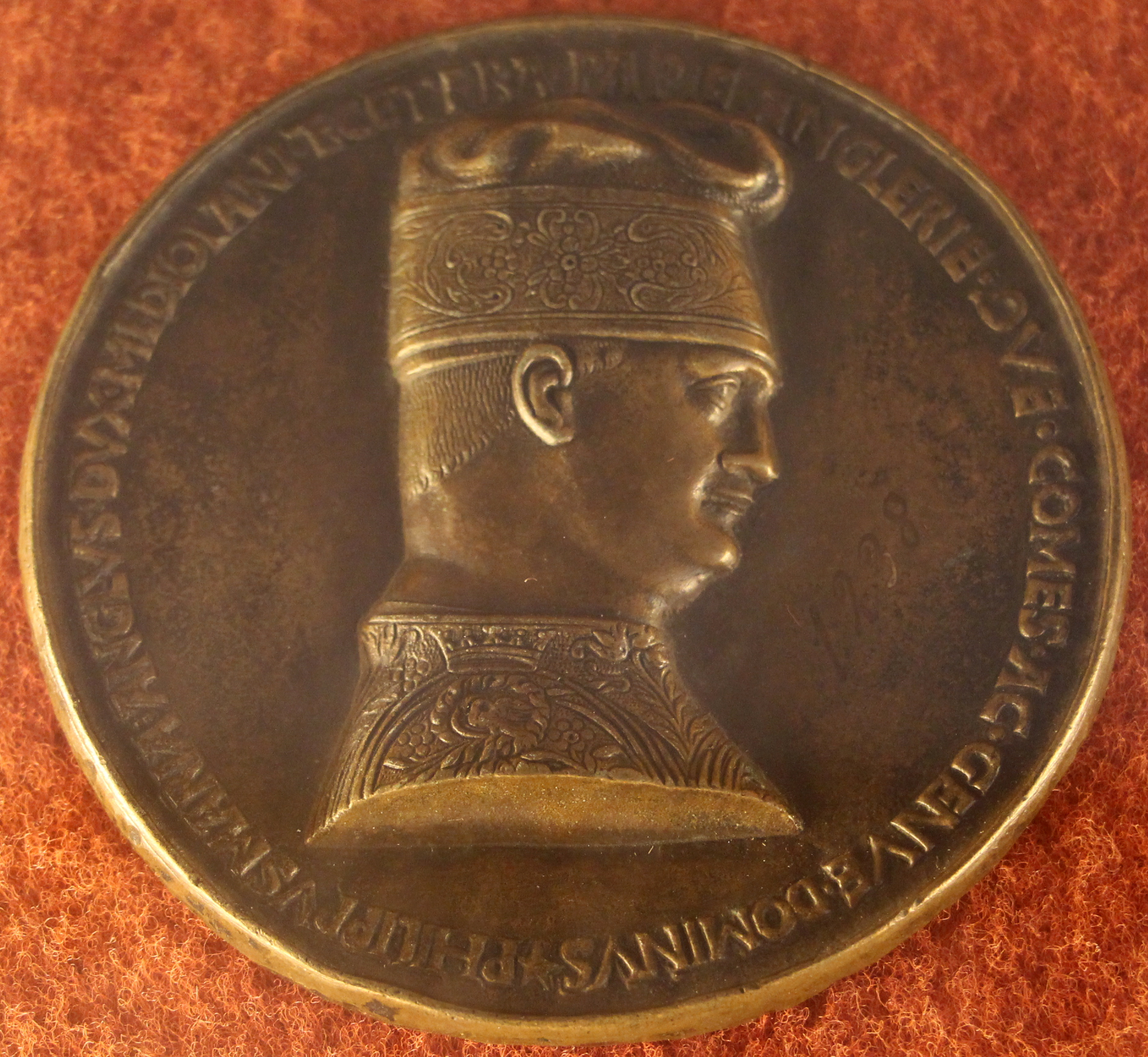 Palazzo Doria-Tursi - Musei di Strada Nuova This is a photo of a monument which is part of cultural heritage of Italy. The making of this document was supported by Wikimedia CH. (Submit your project!) For all the files concerned, please see the category Supported by Wikimedia CH.